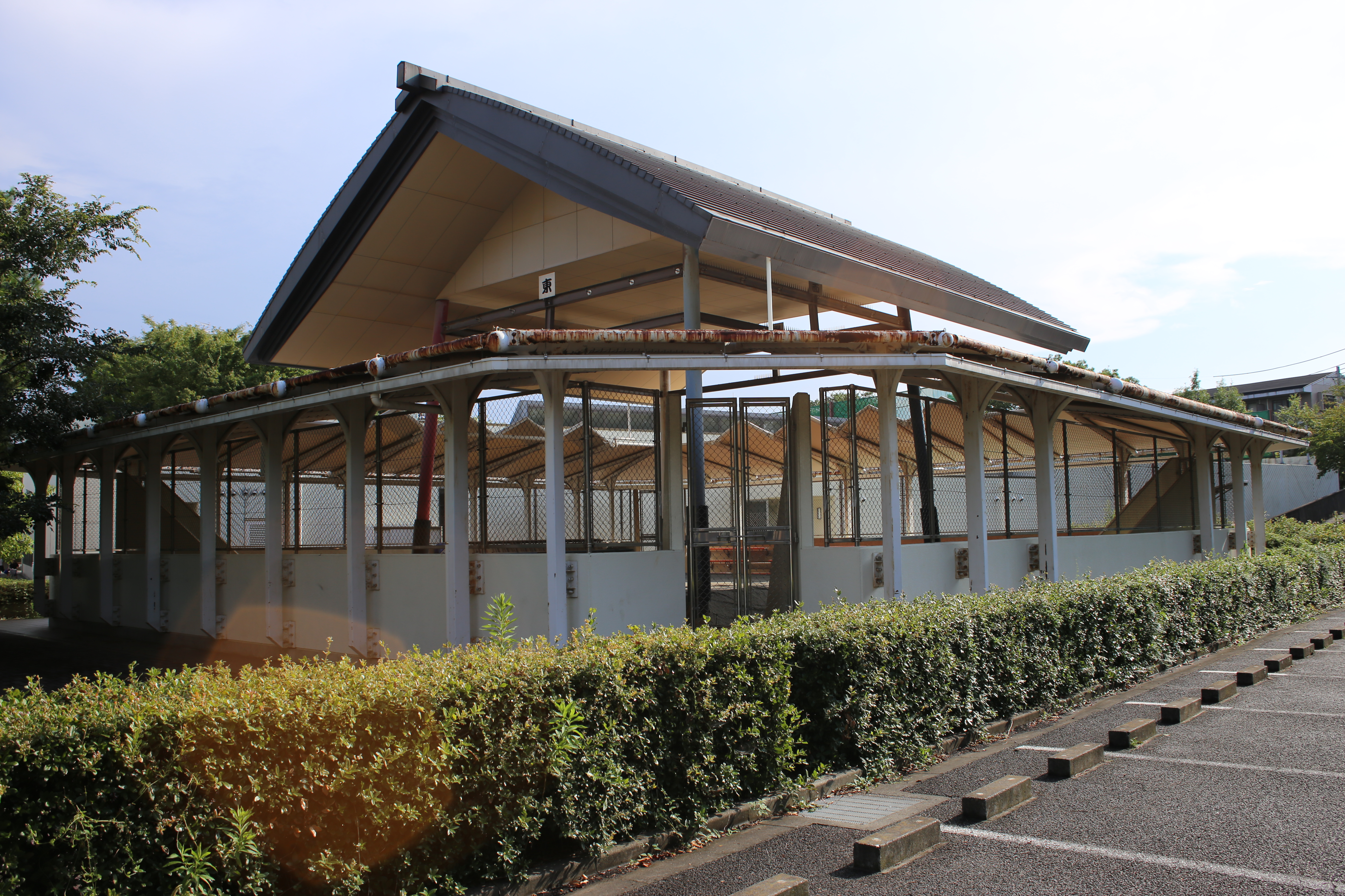 名古屋市瑞穂区の瑞穂公園相撲場